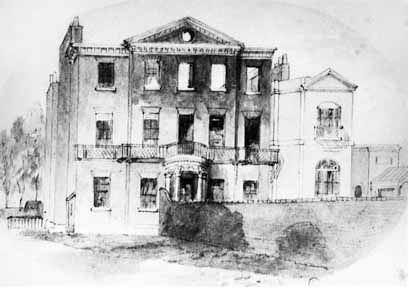 Brunswick House Zeichnung um 1860. Ohne Autor.